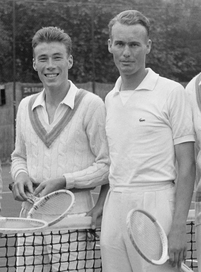 Tennis: Nederland tegen België. V.l.n.r. Brichant en Ivo Rinkel